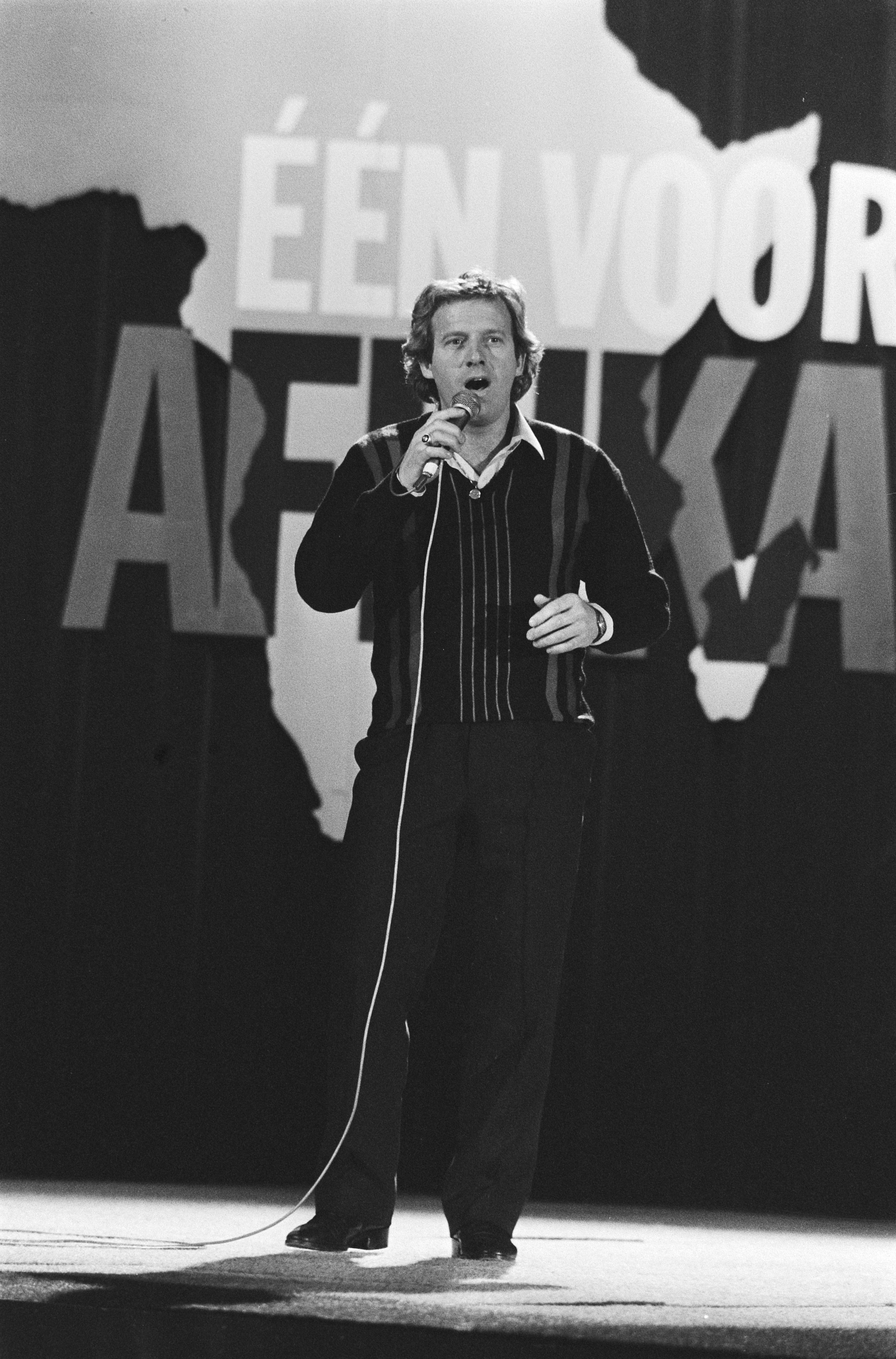 Collectie / Archief : Fotocollectie Anefo Reportage / Serie : [ onbekend ] Beschrijving : Actie "Een voor Afrika" gisteravond beeindigd met een stand van over de 50 miljoen 20, 21 Koos Alberts , 22, 23 de hal waar je geld kon brengen Datum : 27 november 1984 Trefwoorden : Acties, zangers Persoonsnaam : Alberts, Koos Fotograaf : Vollebregt, Sjakkelien / Anefo Auteursrechthebbende : Nationaal Archief Materiaalsoort : Negatief (zwart/wit) Nummer archiefinventaris : bekijk toegang 2.24.01.05 Bestanddeelnummer : 933-1631